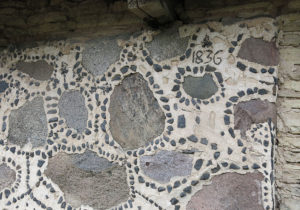 Noriūnų dvaro kumetyno fragmentas su data "1836"